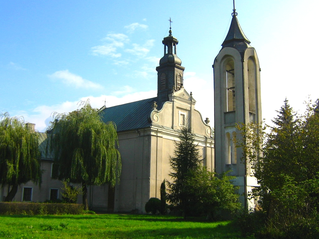 Zespół klasztorny franciszkanów w Wyszogrodzie (widok od dzwonnicy)